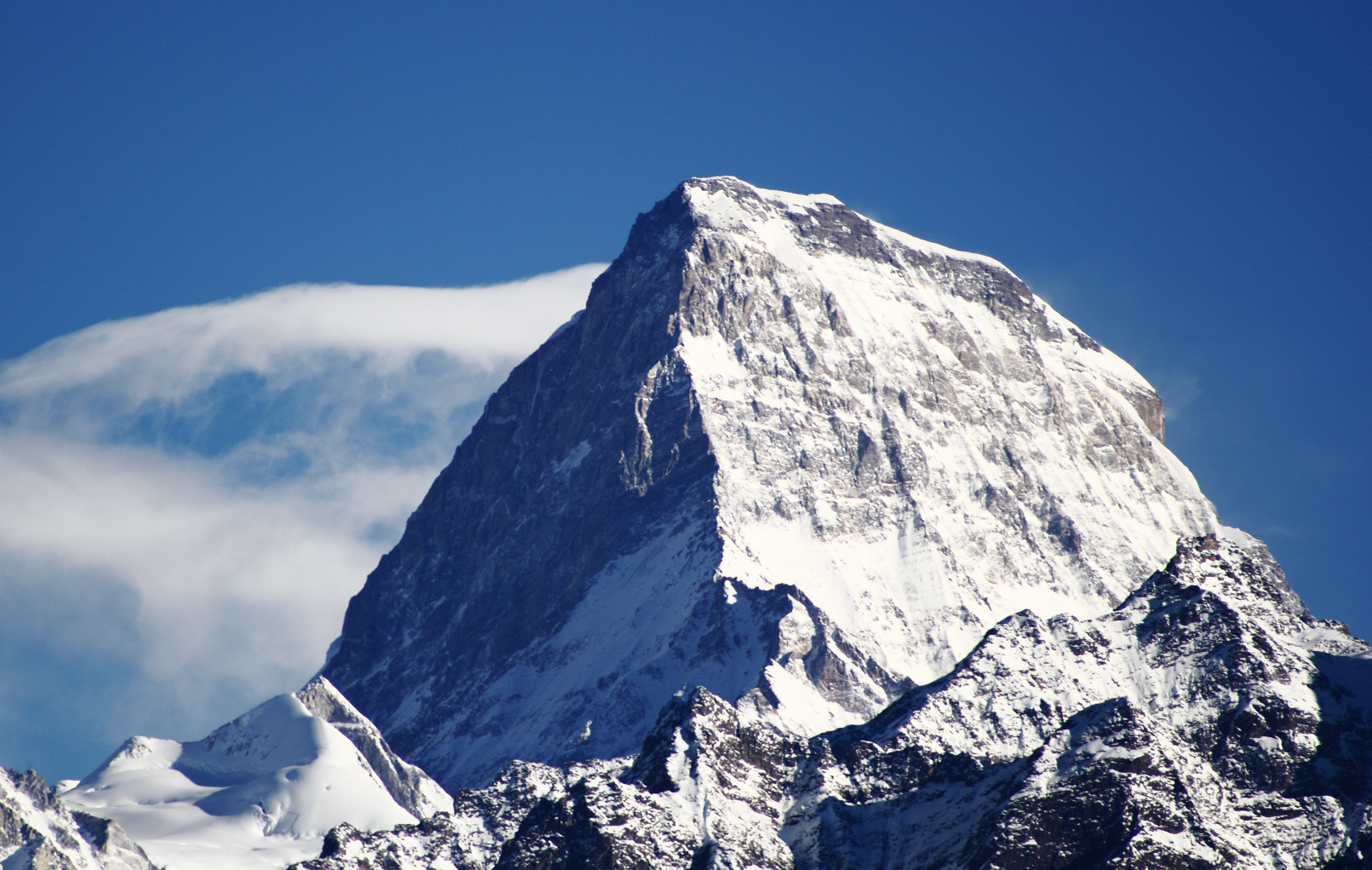 Nilgiri Parbat